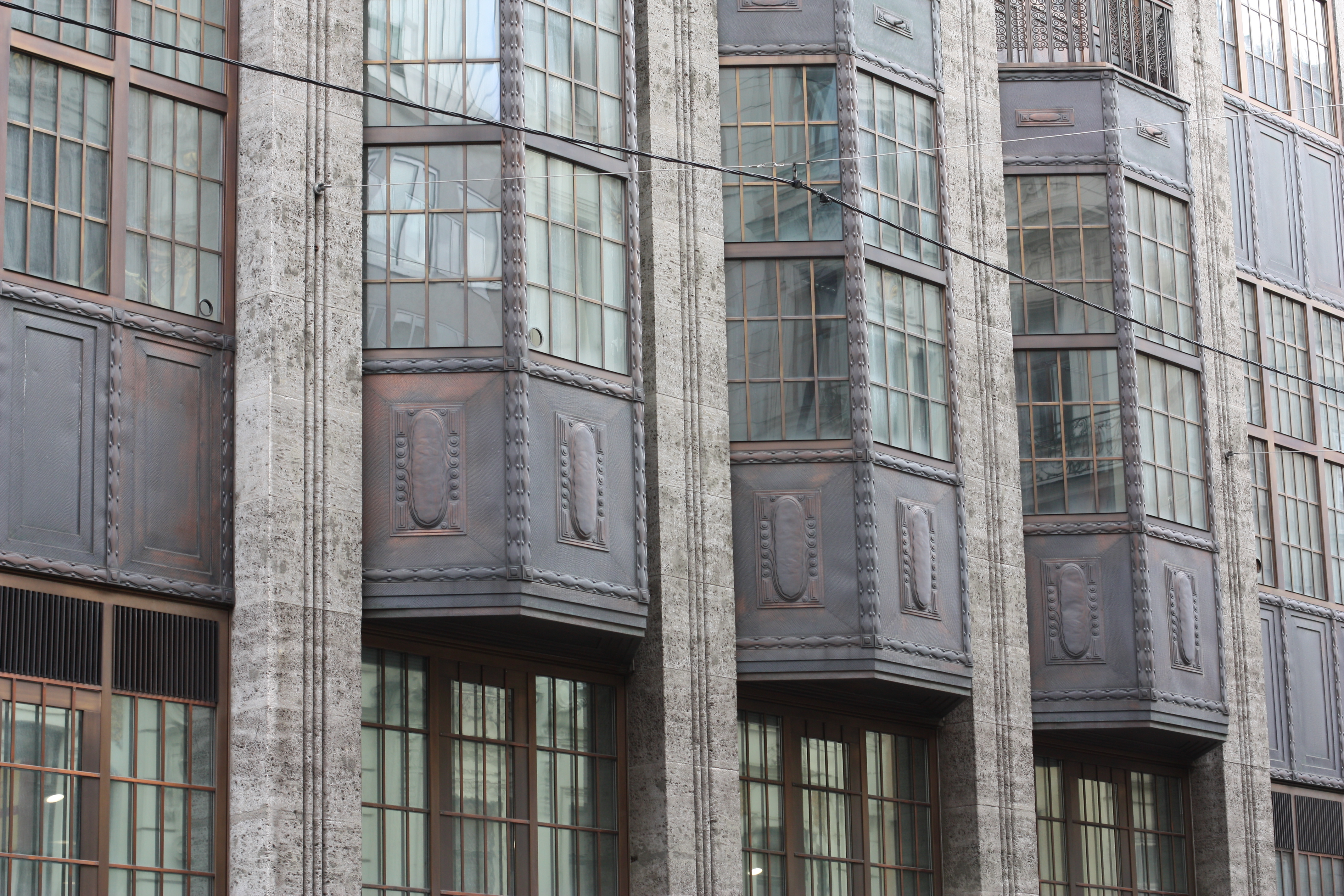 Zentrum, Vienna, Wien